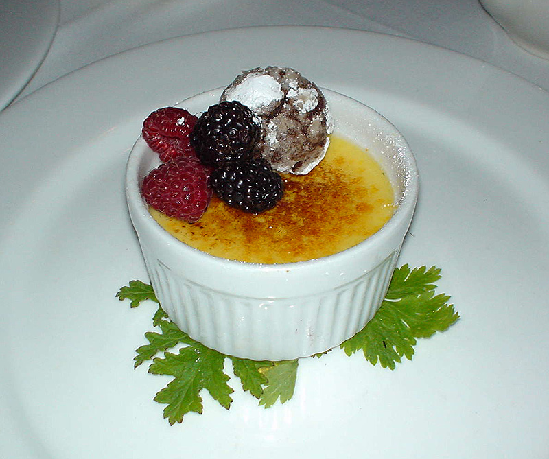 Crème brûlée with berries